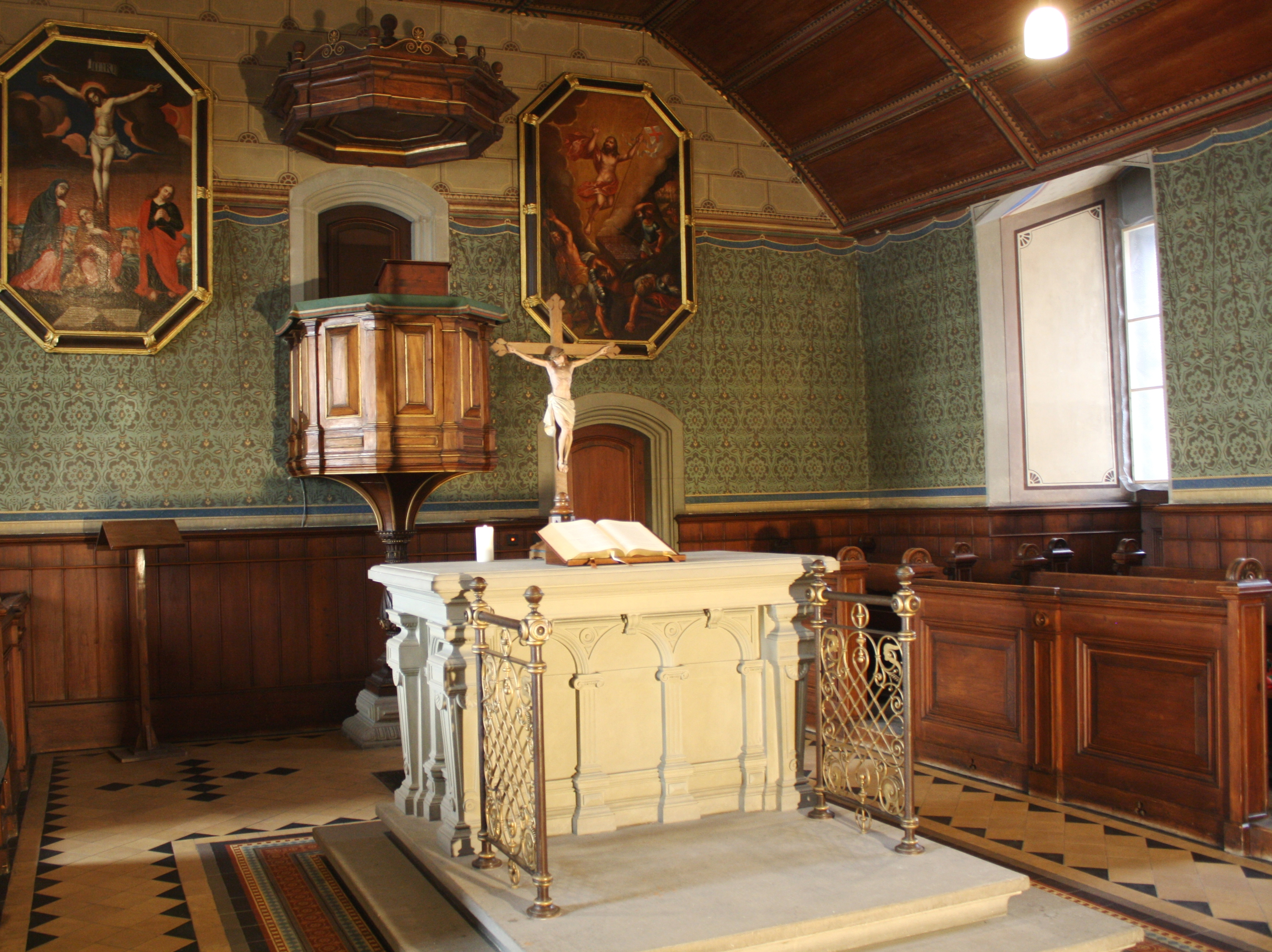 Tübingen. Schlosskirche. Altar und Kanzel